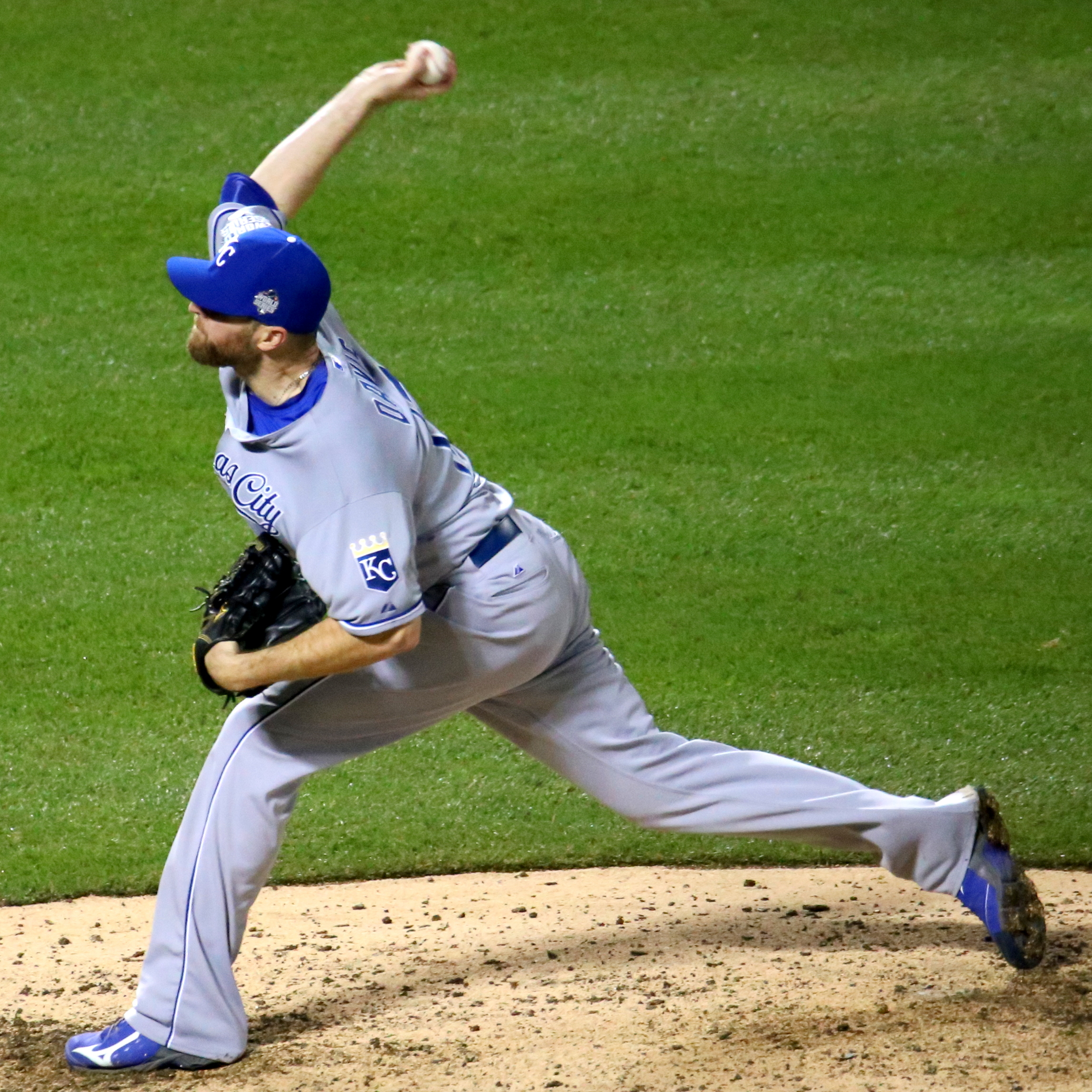 Wade Davis